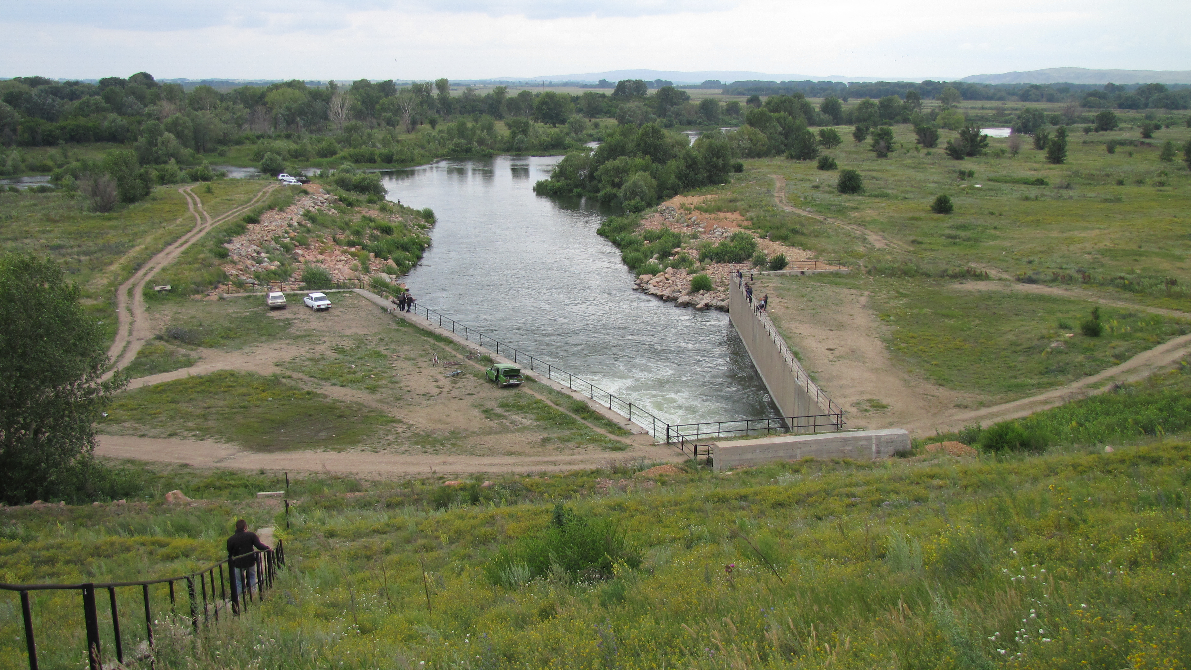 Дамба Гилёвского водохранилища (Алтайский край, Россия)